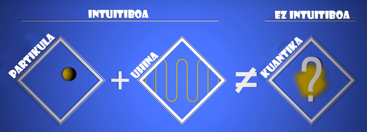 a